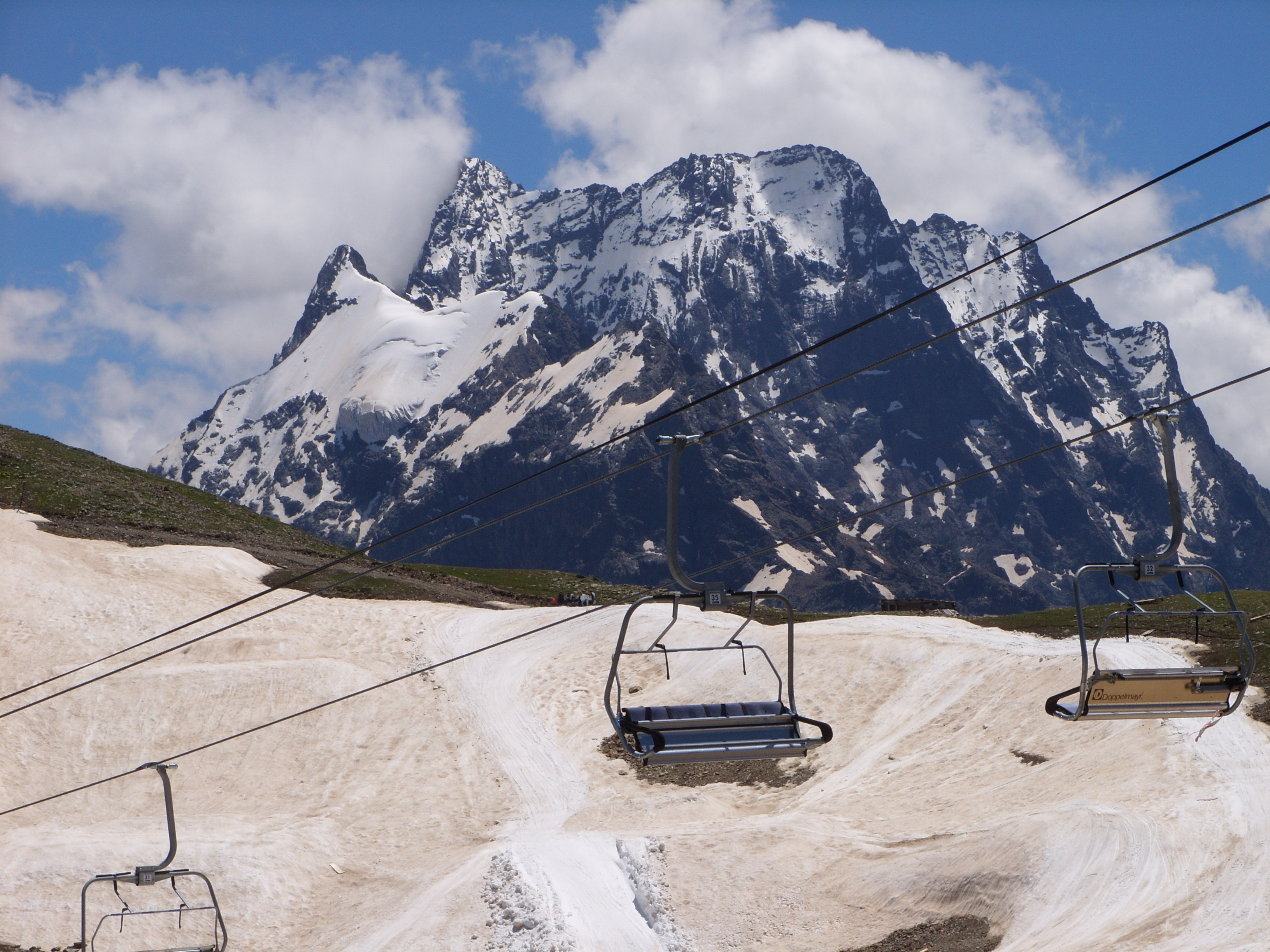 Экскурсия в Домбай из Железноводска, июль 2009 г.